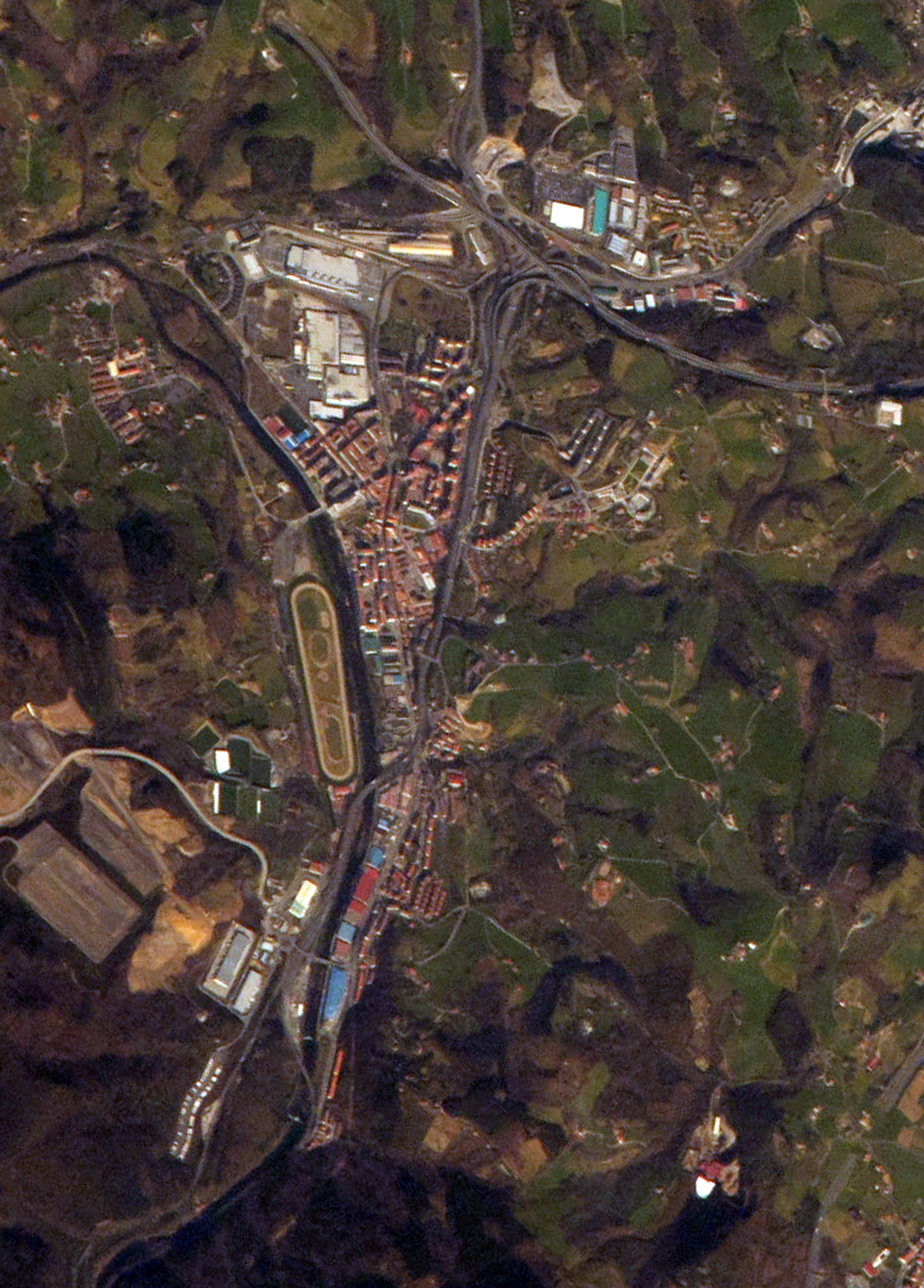 Lasarteko irudia, Thomas Pesquet astronautak Nazioarteko Espazio Estaziotik egina. Argazkiaren kolore aldaketa eta mozketa nire lana da.